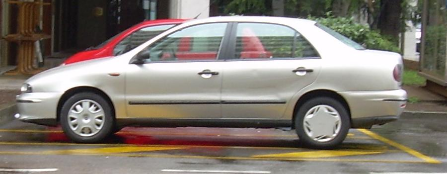 Rielaborazione di tagliando i particolari superflui 18:50, 4 ago 2006 . . Af96 (Discussione